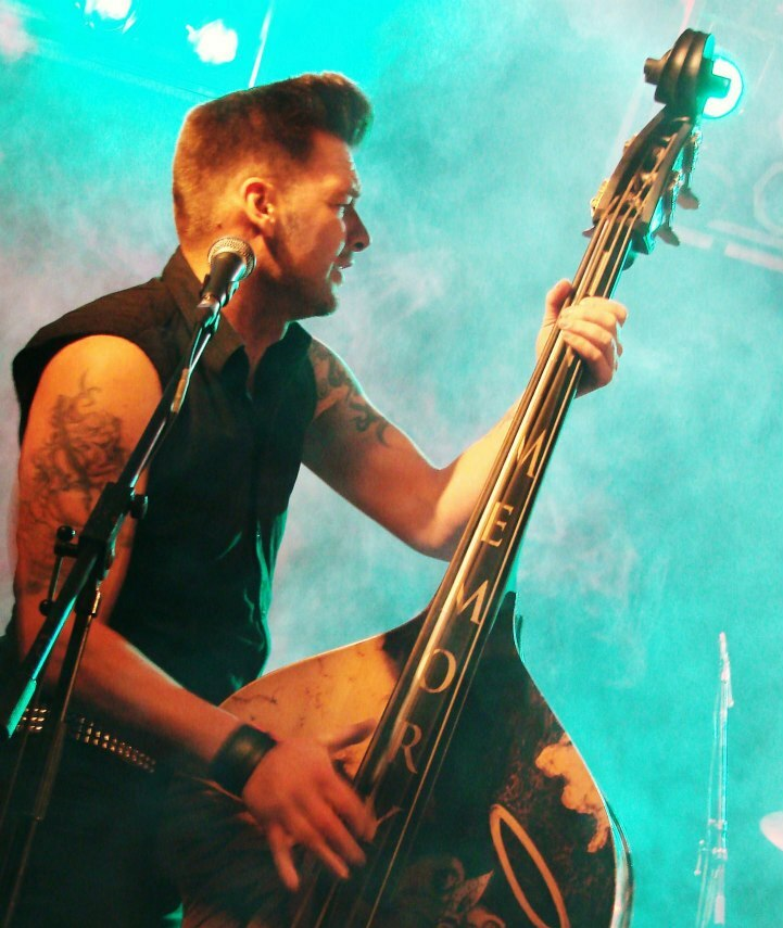 Psychobilly Earthquake 2012 in Bremen, Auftritt mit den Bad Dooleys